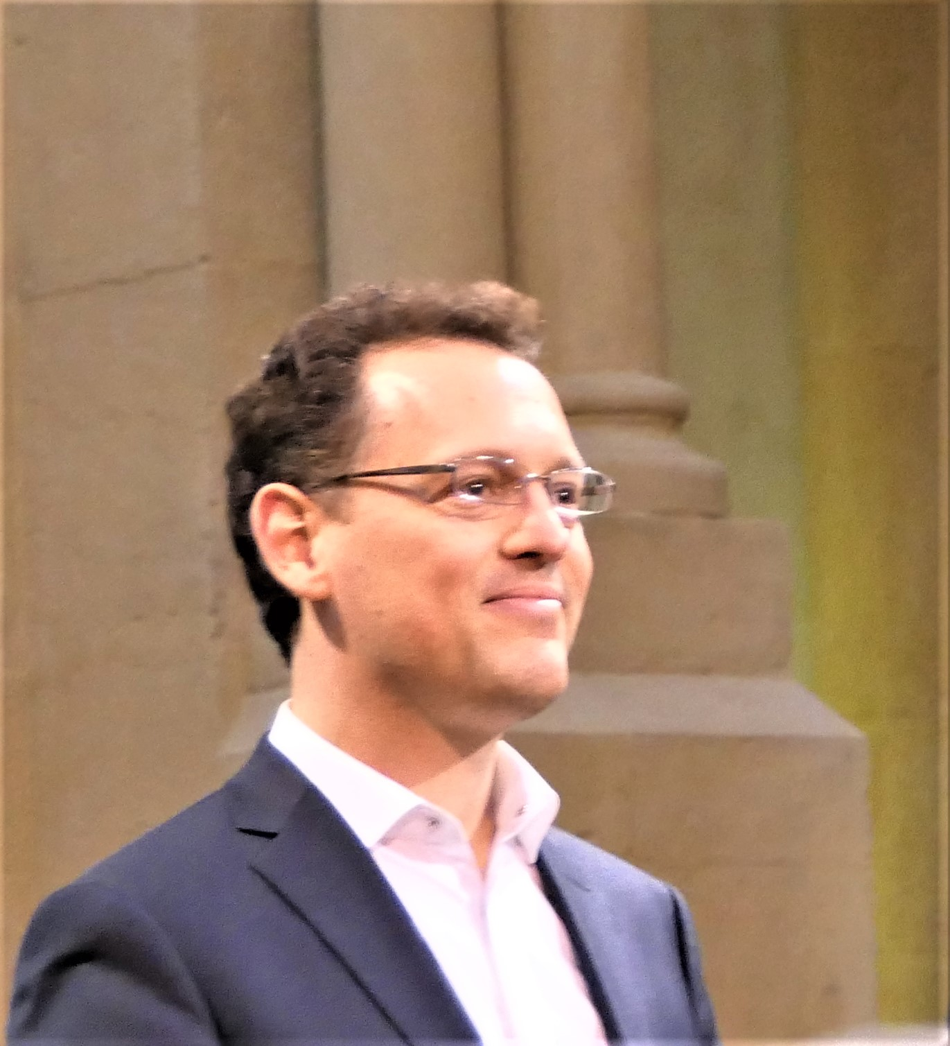 Jean-Baptiste Robin, organiste et compositeur, lors d'un concert à l'église de Charolles (Saône-et-Loire) le 26 mars 2017